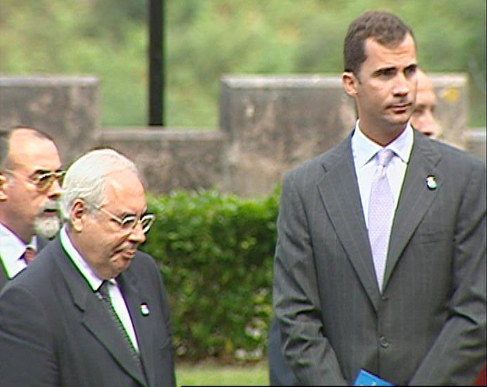 Felipe de Borbón y Grecia and Vicente Álvarez Areces in Cuadonga (Asturies - Spain)